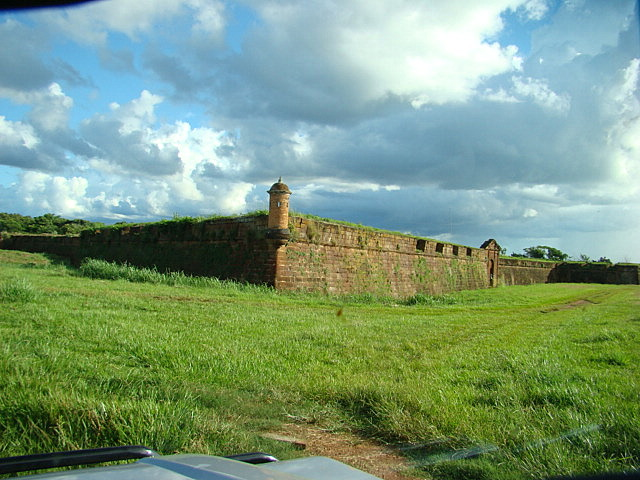 Forte Príncipe da Beira - Ruinas